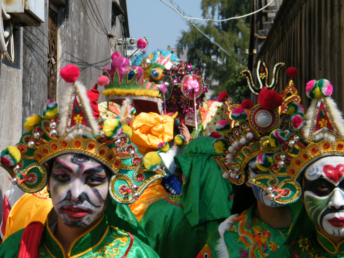 2011.2.3 正月初一达濠达埠巡游 英歌队